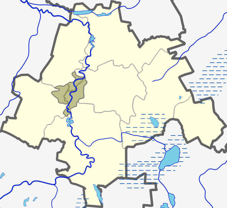 Marijampolės žemėlapis.